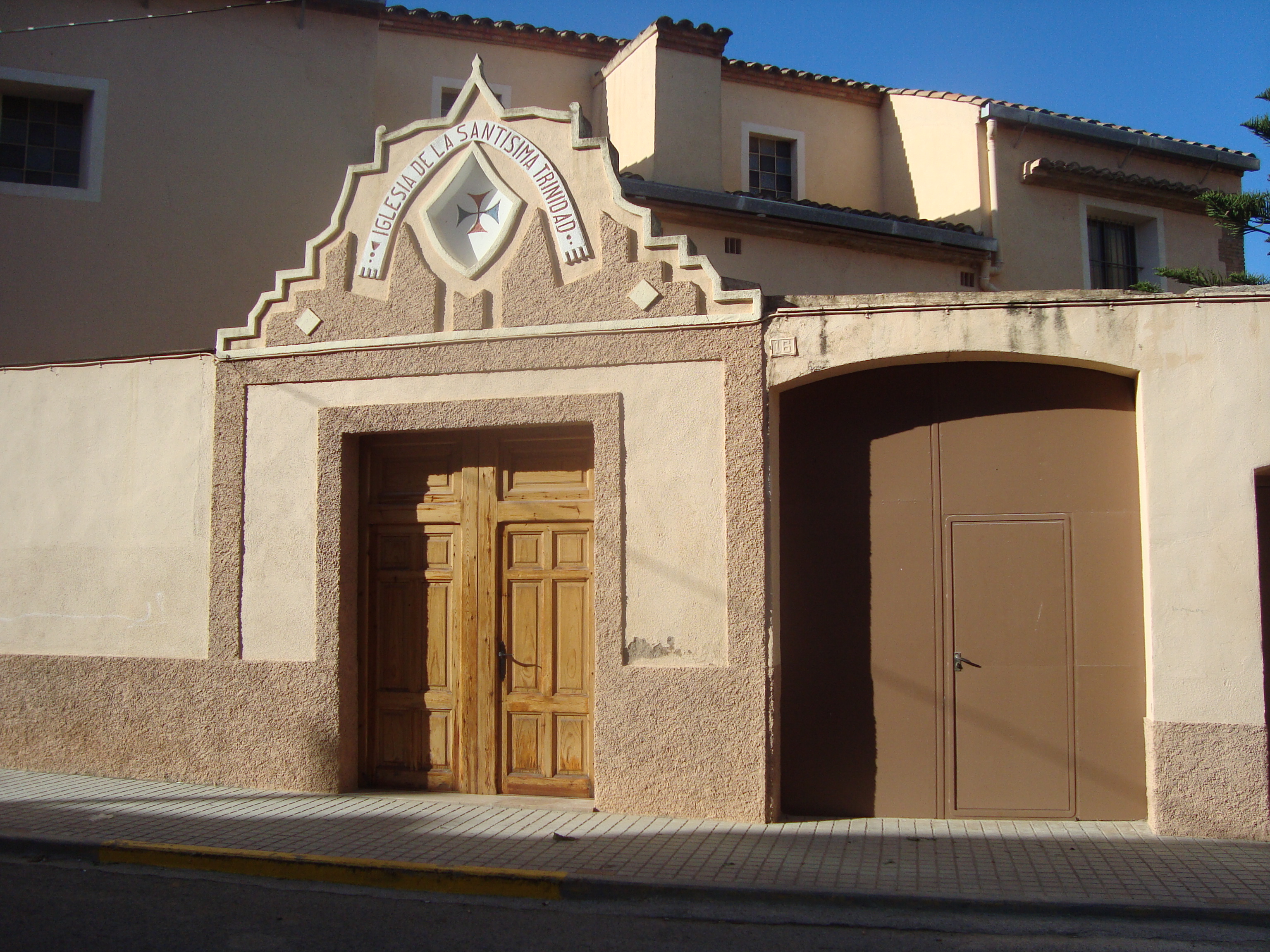 Esglesia de la Santísima Trinidad de Càlig